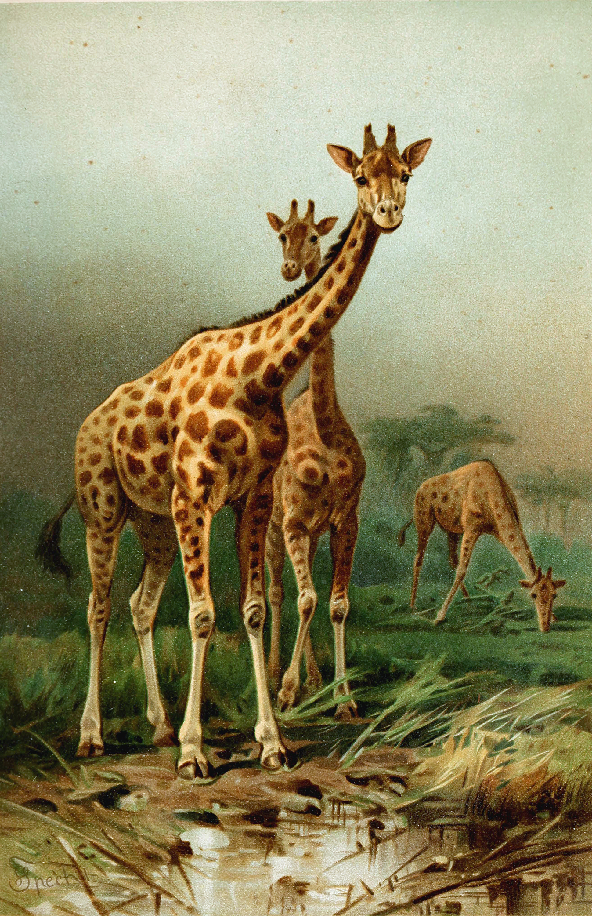 Giraffa_camelopardalis